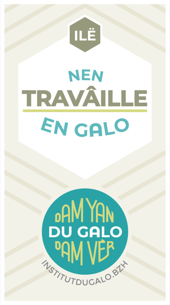 Élément de signalétique du label Du Galo, dam Yan, dam Vèr ! Pour l'engagement de niveau 3 en faveur de la normalisation de la langue gallèse comme langue d'échange. Ce signe distinctif permet aux signataires de montrer l'utilisation du gallo dans le quotidien professionnel.